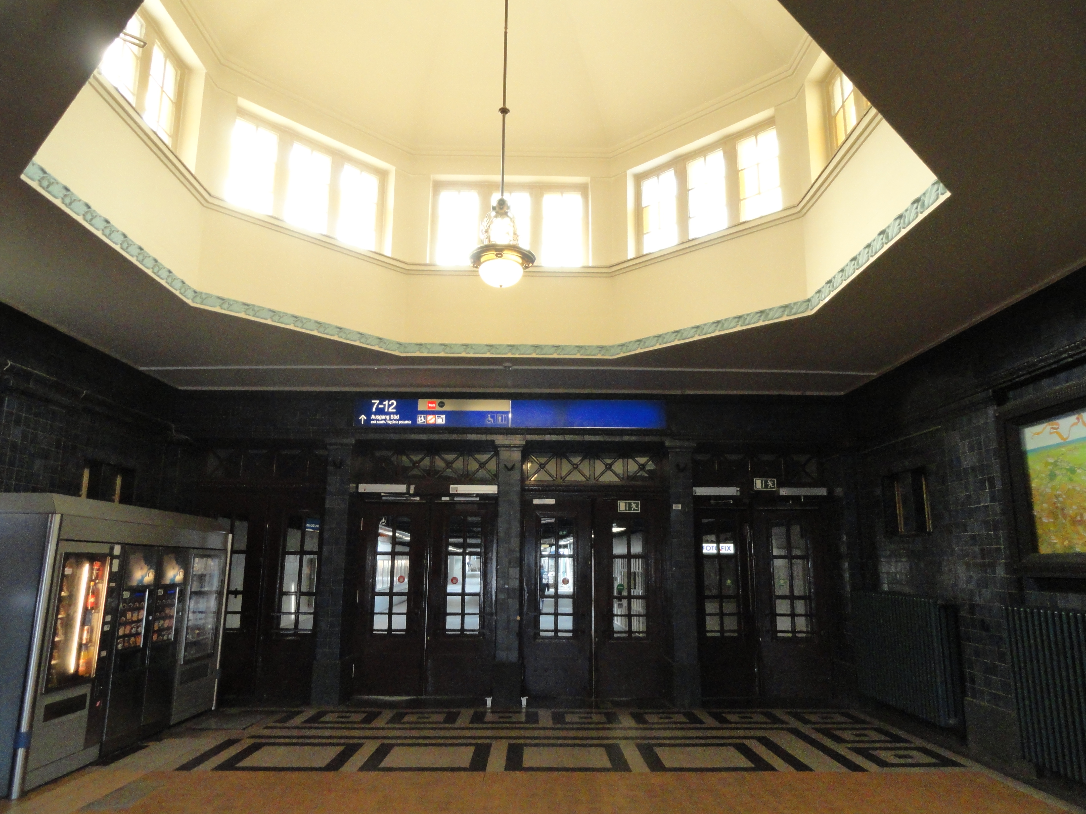 Zugang zum Personentunnel von der Empfangshalle des Bahnhofs Görlitz